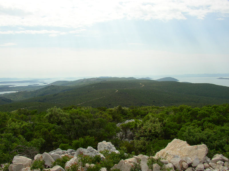 Juzna strana Pašmana